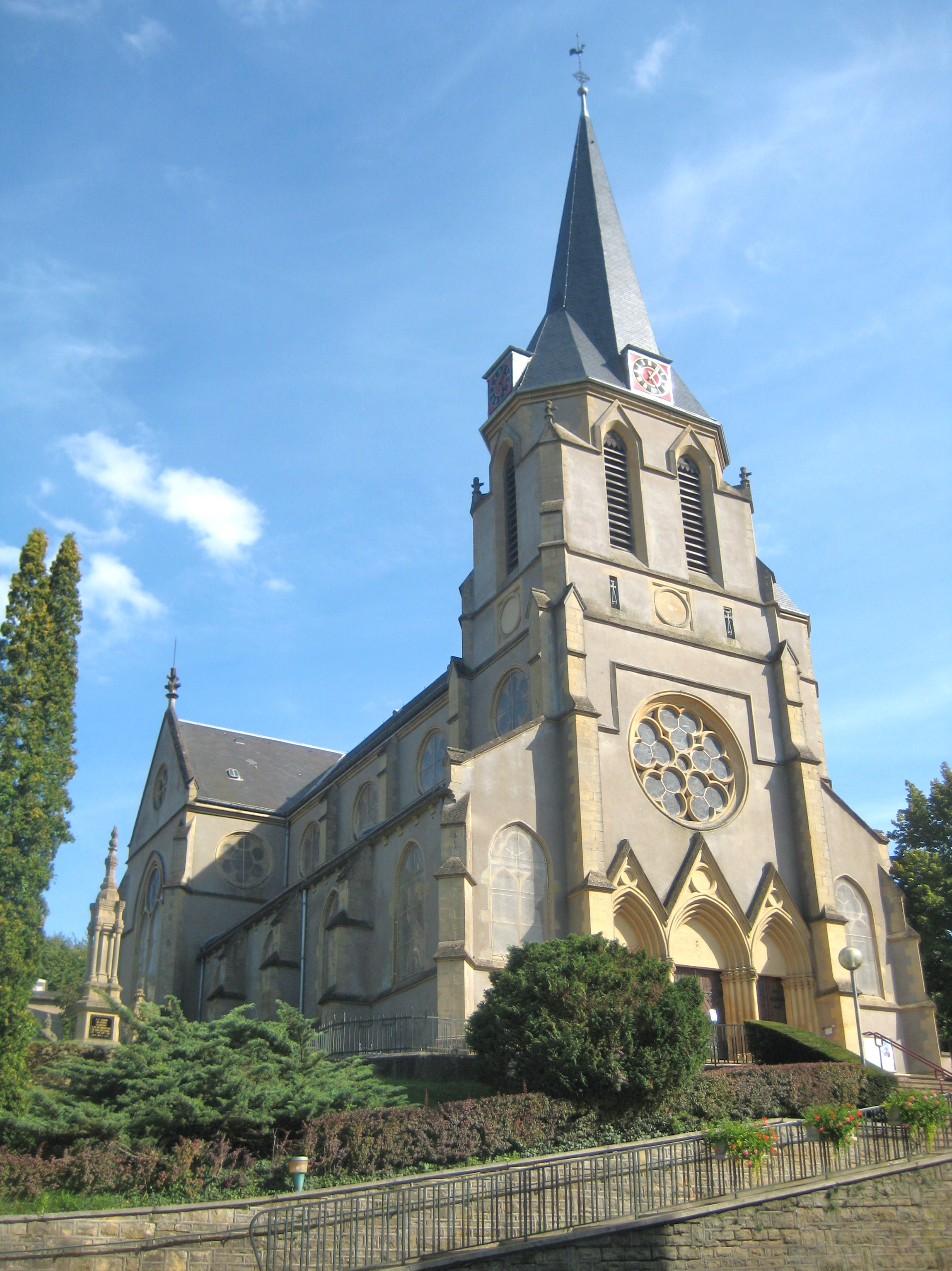 Église catholique Saint-Jean-Baptiste Algrange